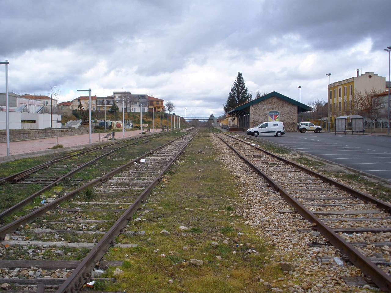 Antigua estación de tren de La Bañeza (provincia de León).